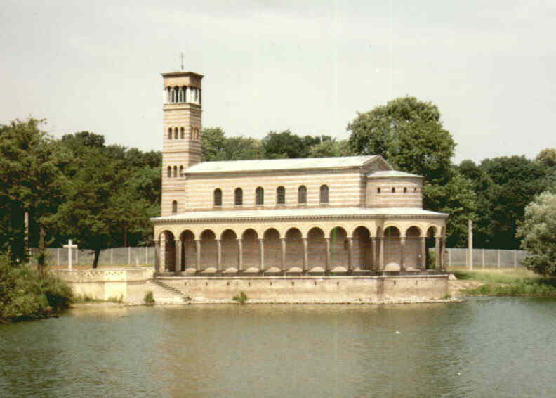 Heilandskirche am Port von Sacrow